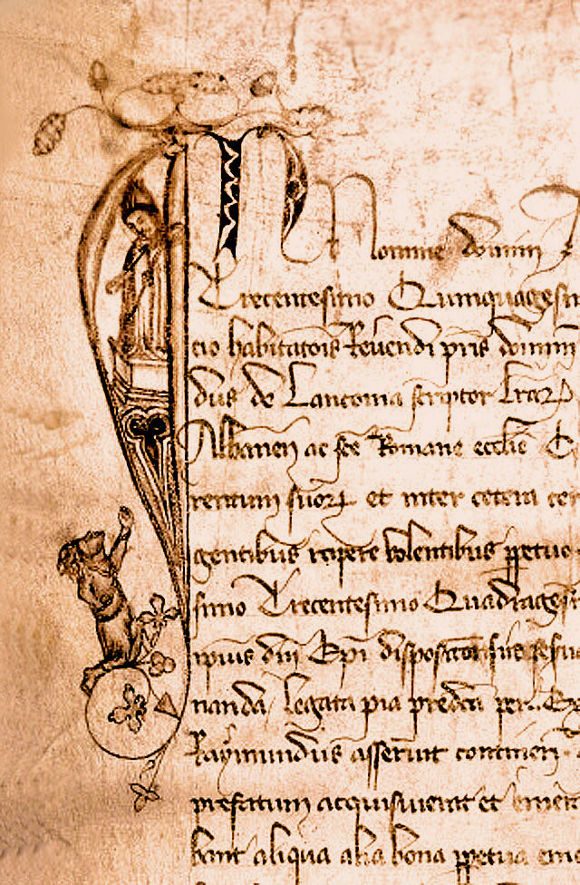 Cartulaire de l'évêché de Carpentras, initiale représentant l'évêque Hugues faisant l'aumône (Bibliothèque Inguimbertine, ms. 561)